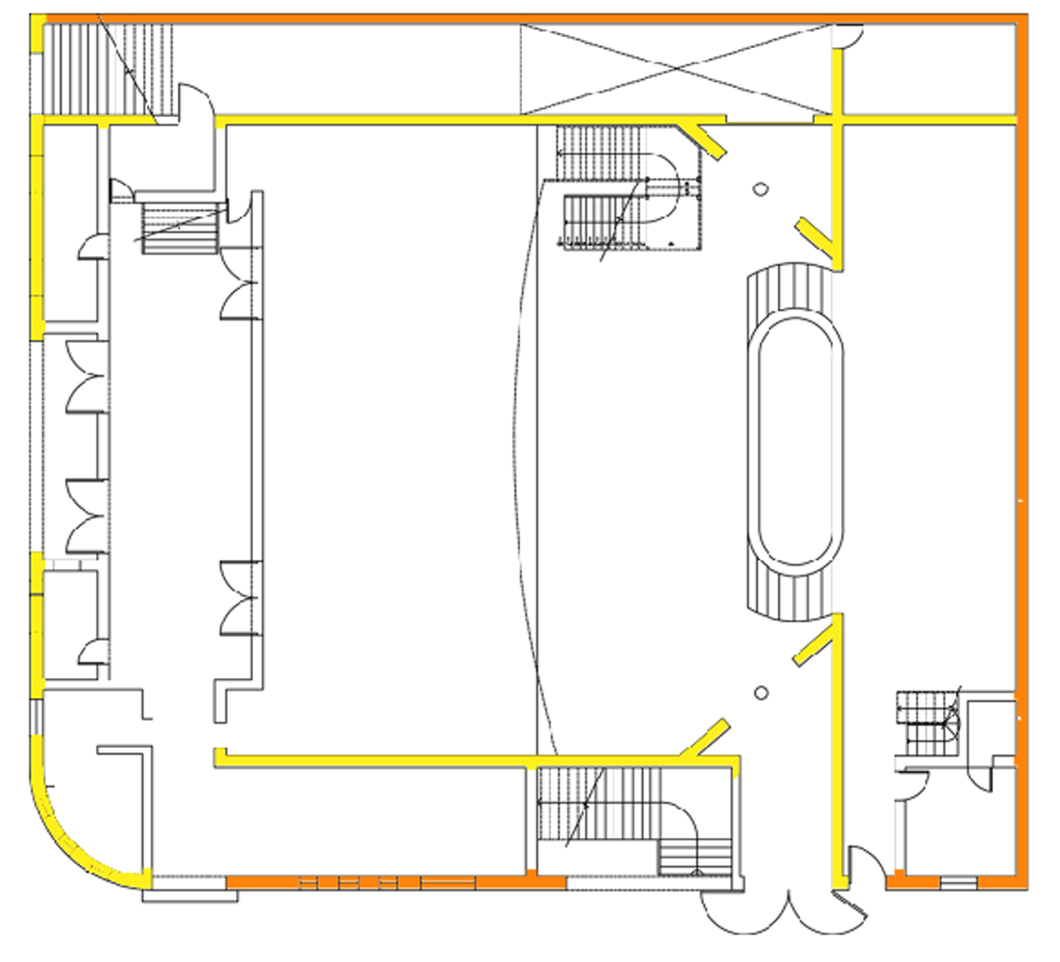 analisis estructural teatro San Bernardo, San Bernardo, Santiago, Chile